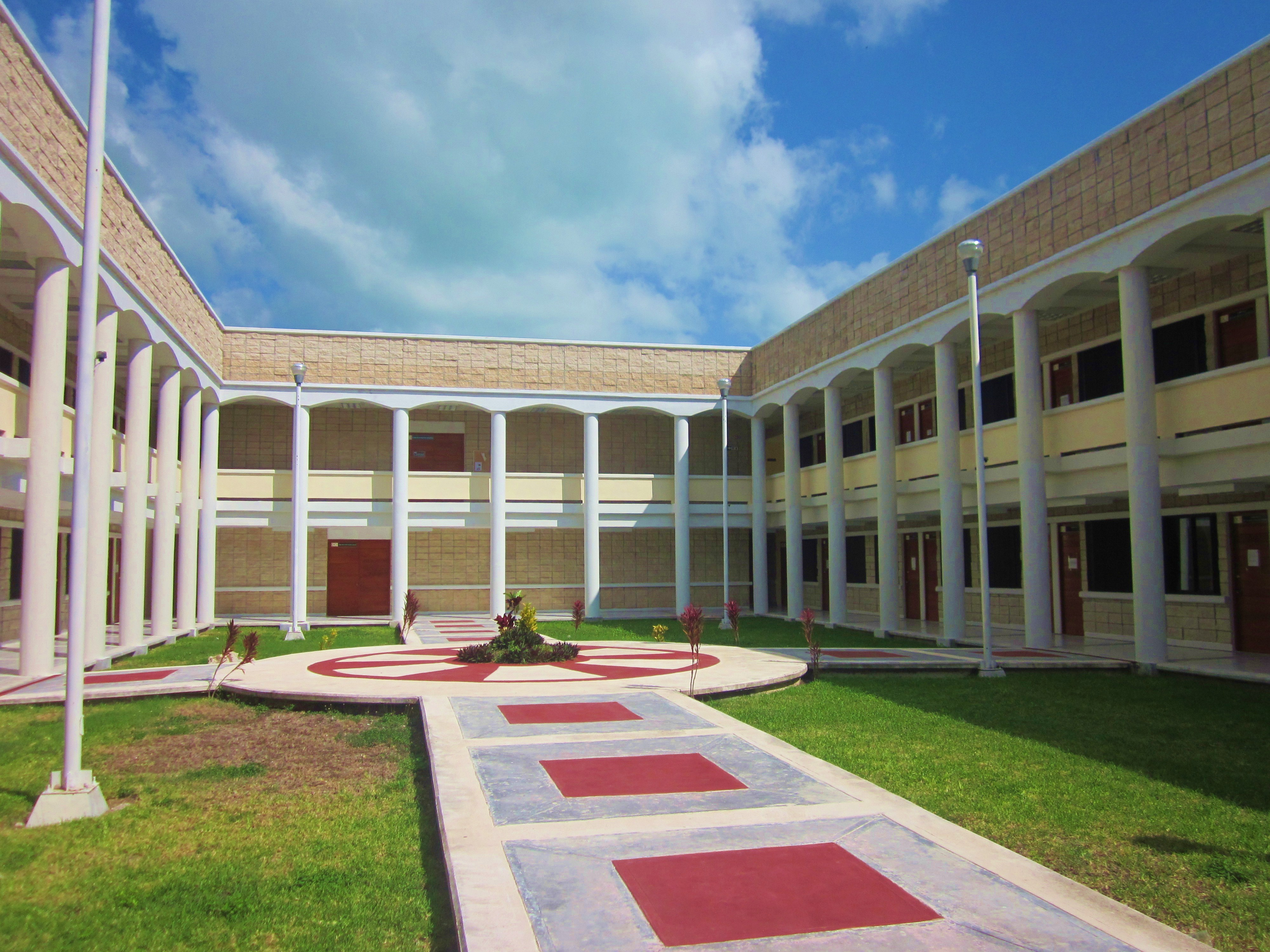 División de Ciencias e Ingenierías, UQROO, Chetumal.